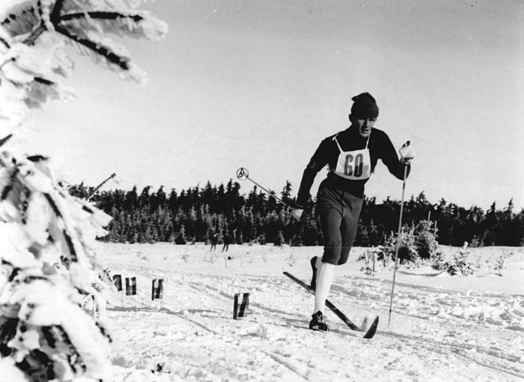 Axel Lesser Zentralbild Thieme 3.3.1968-Oberhof: XX. DDR-Skimeisterschaften in den Nordischen Disziplinen (3.3.1968)-Den letzten Langlauftitel der diesjährigen Meisterschaften sicherte sich über 50 km der Oberhofer ASK-Sportler Axel Lesser.